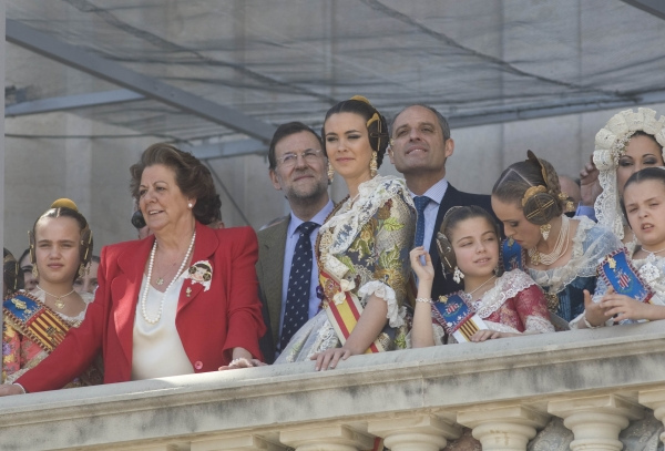 Rajoy en València, com a líder de l'oposició.